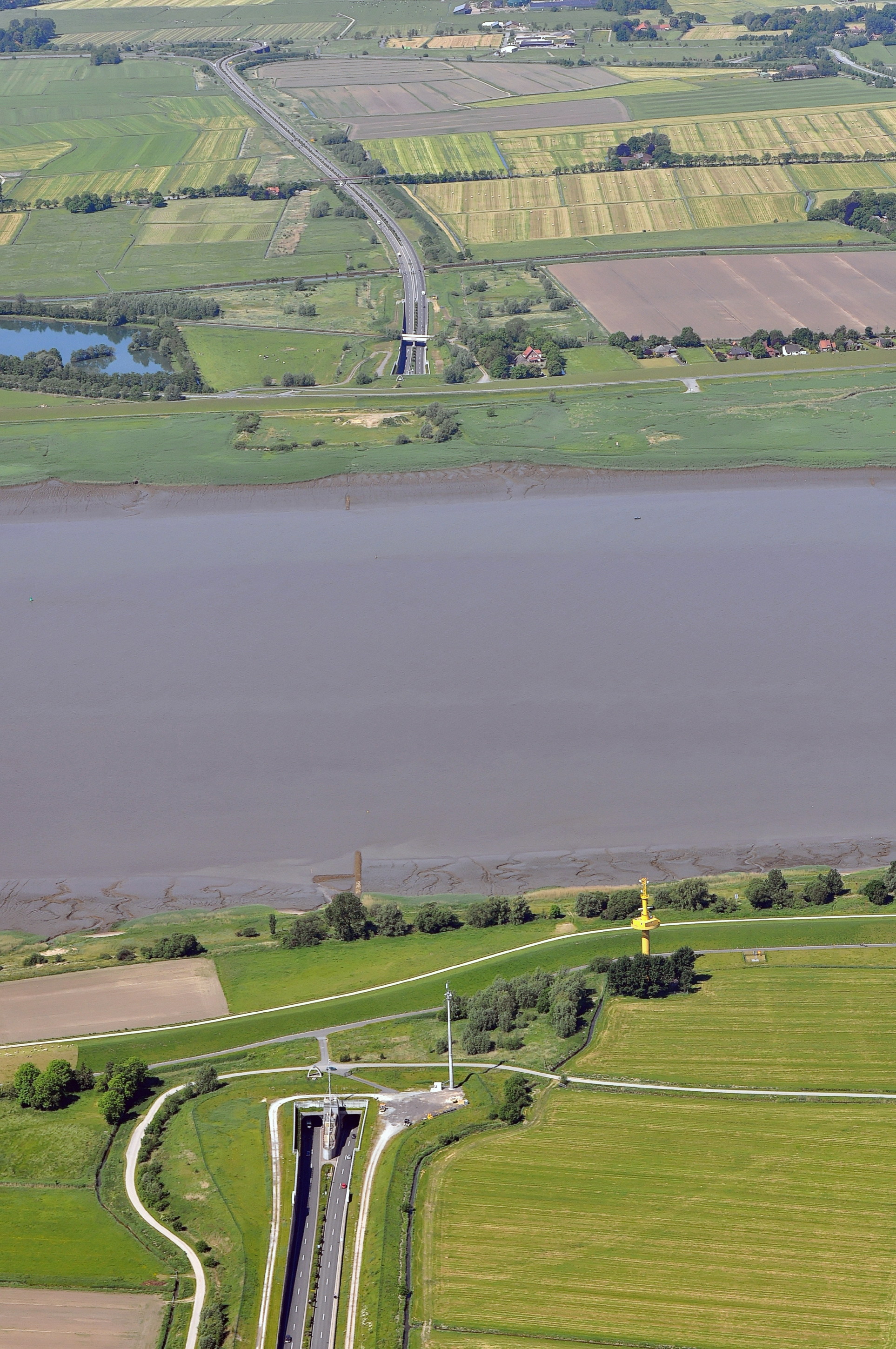 Luftbilder von der Nordseeküste 2012-05: Blick von Osten über den Wesertunnel, im Vordergrund die Einfahrt Ost in Loxstedt (Landkreis Cuxhaven), im Hintergrund Bereiche im Landkreis Wesermarsch, dazwischen die Weser